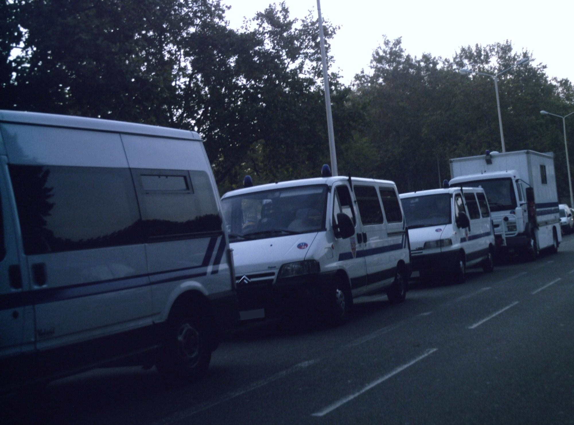 Quelques véhicules de CRS stationnés avant le départ des bus des supporters de l'Olympique lyonnais pour le stade de Saint-Étienne, le 31 octobre 2010